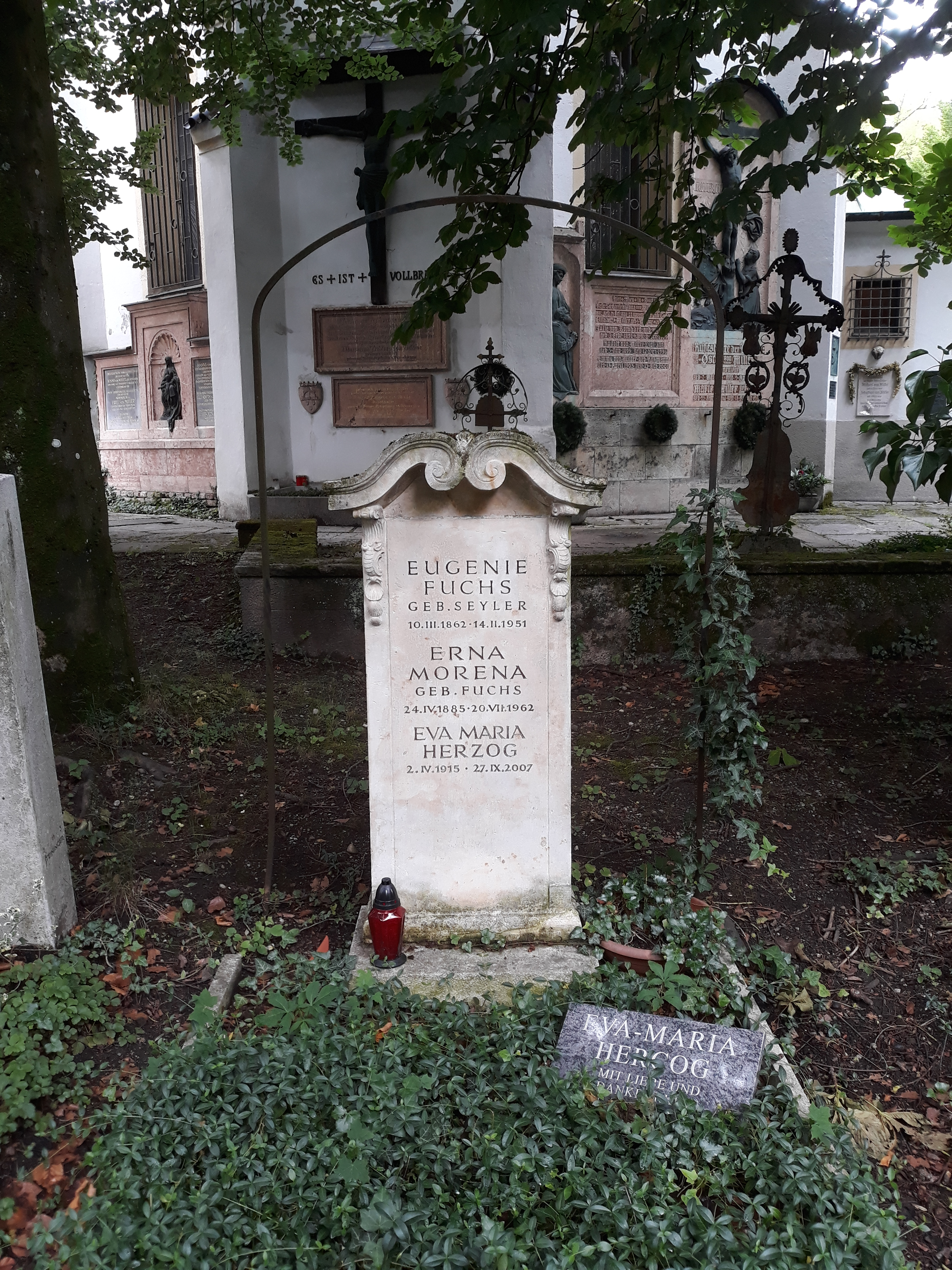 Das Grab der deutschen Schauspielerin Erna Morena mit Mutter und Tochter auf dem Neuhauser Friedhof in München.